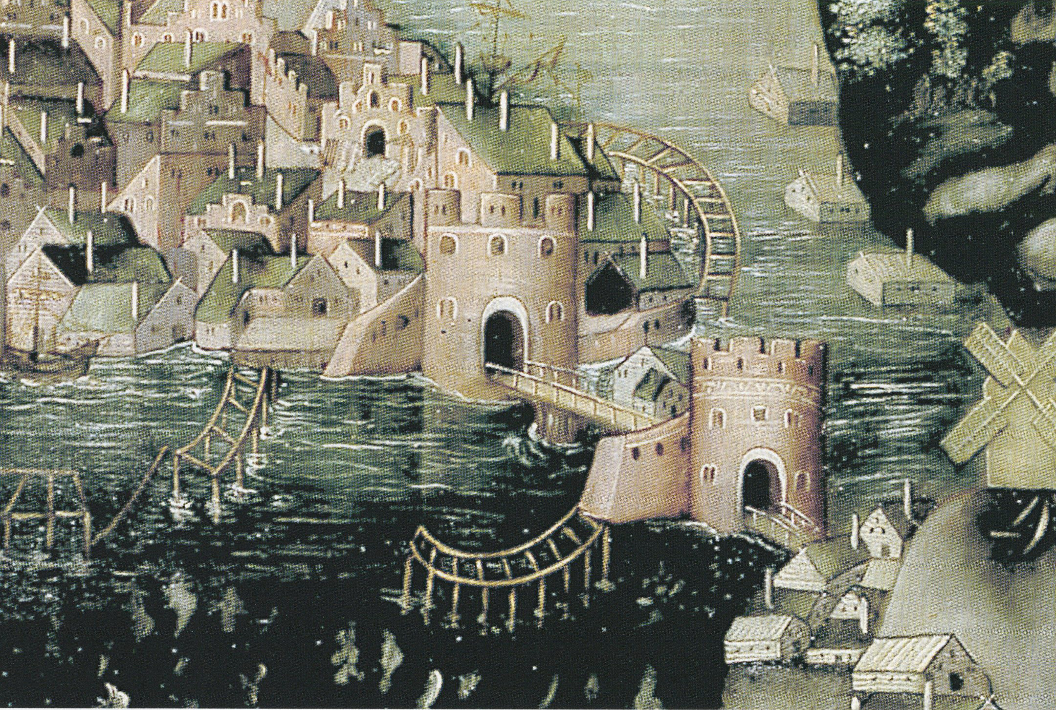 Detalj av Vädersolstavlan visande dagens Slussenområde och Söderström